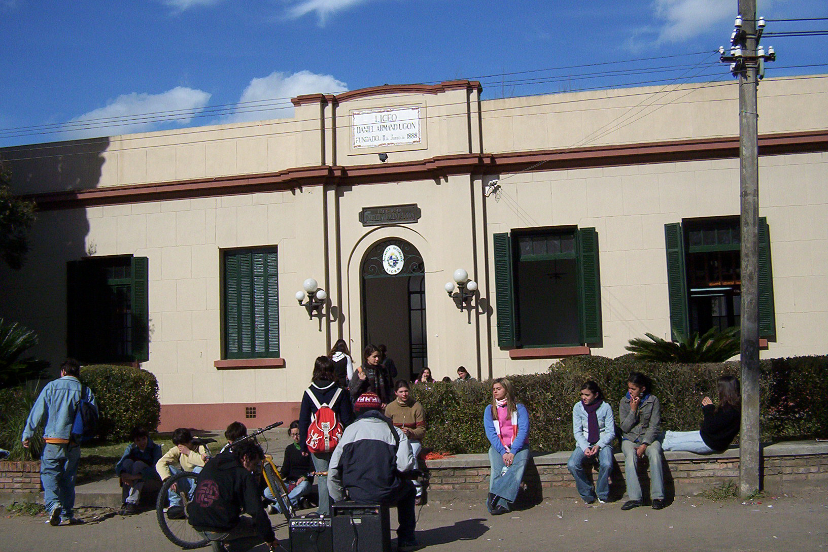 Movilizaciones en el Liceo Daniel Armand Ugón, Colonia Valdense, Uruguay.